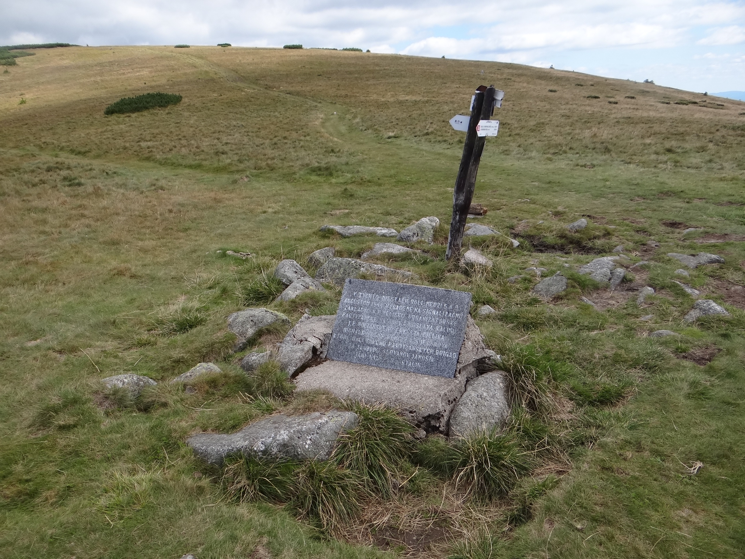 Sedlo Zámostkej hole